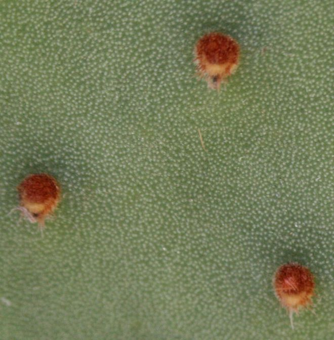 Glochidiák (Opuntia microdasys areolái)